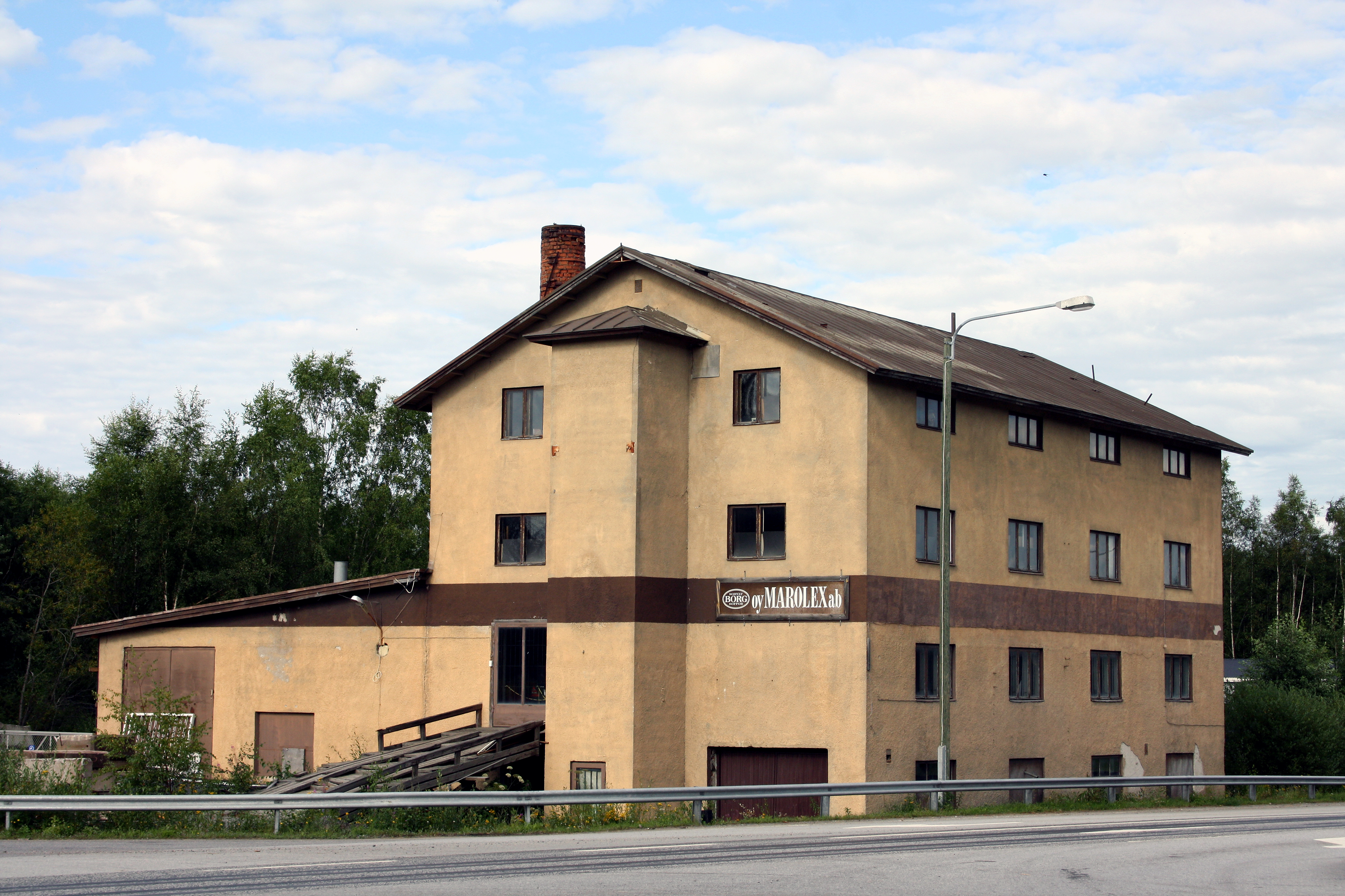 Kokkolassa, Suomessa sijaitseva rakennus jossa toimi 1950-luvulla Ähtävän Muovi Oy:n teuraskeittämö.